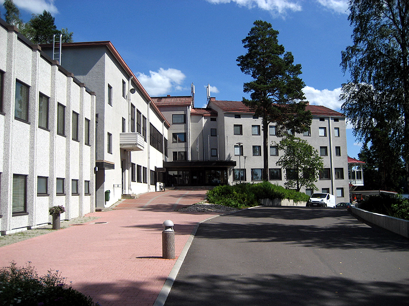 Liikuntakeskus Pajulahti, Nastola